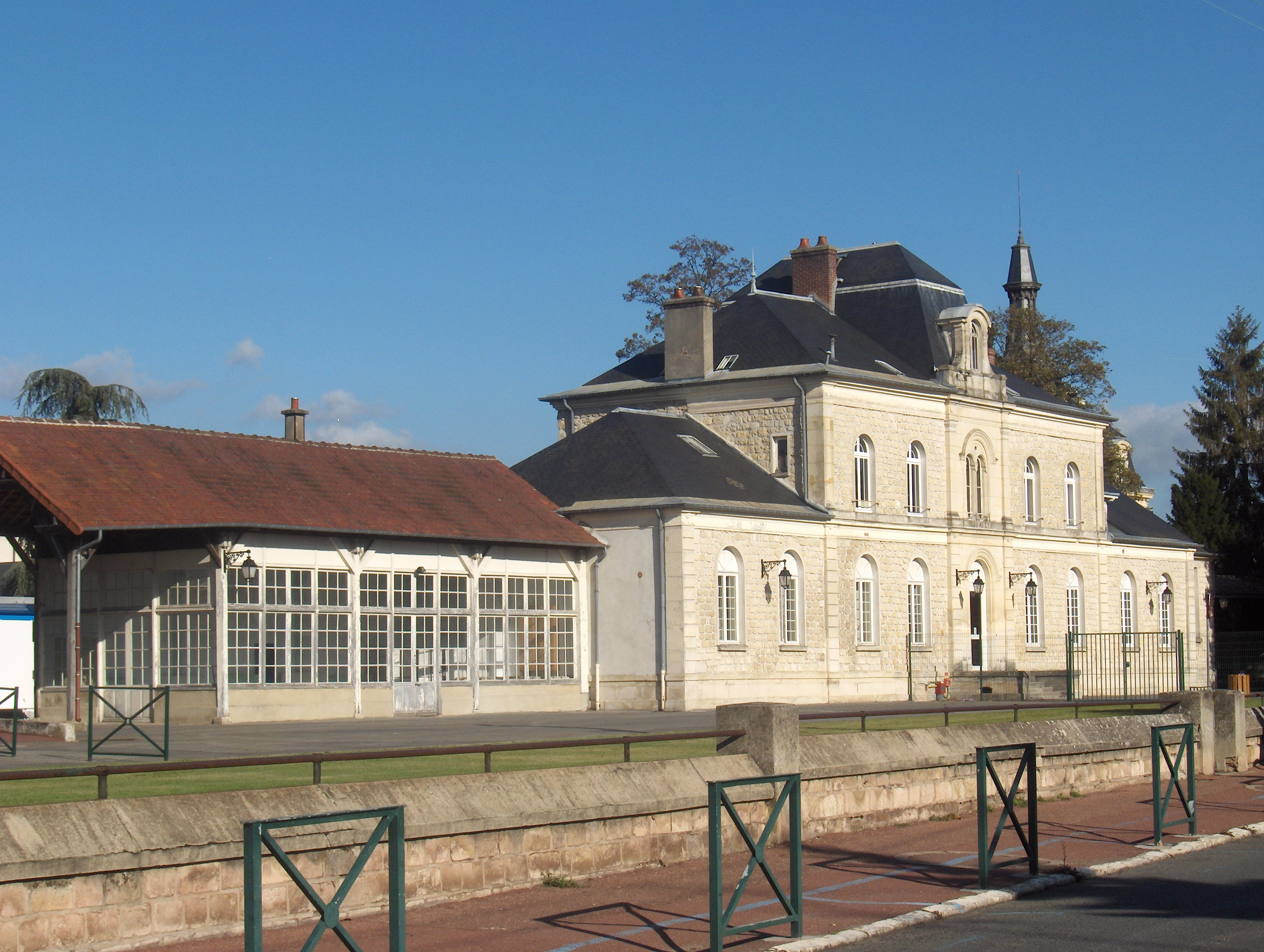 Ecole Albert Camus à L'Isle-Adam (Val-d'Oise)